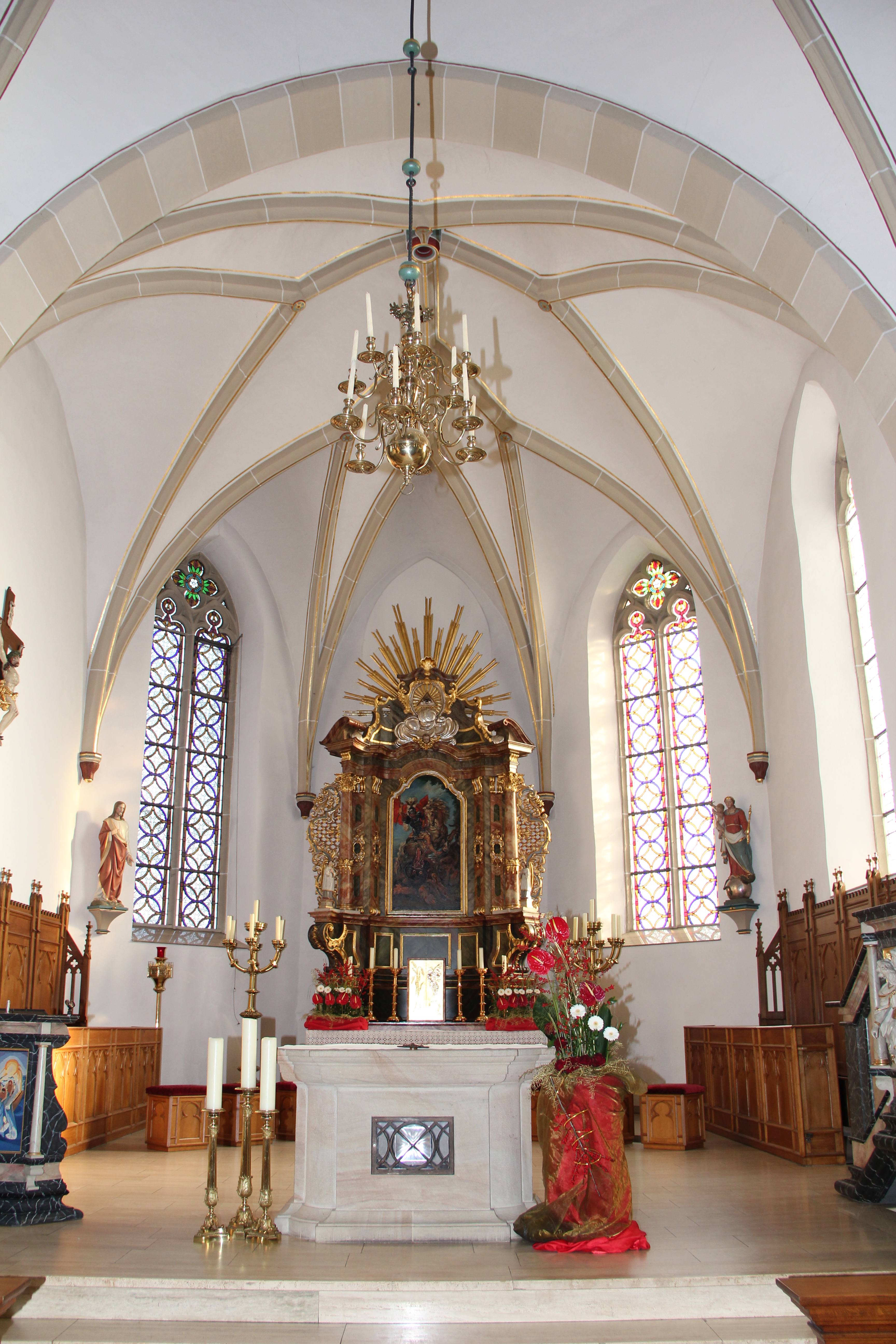 Innenansicht der Kirche St. Georg in Hopsten